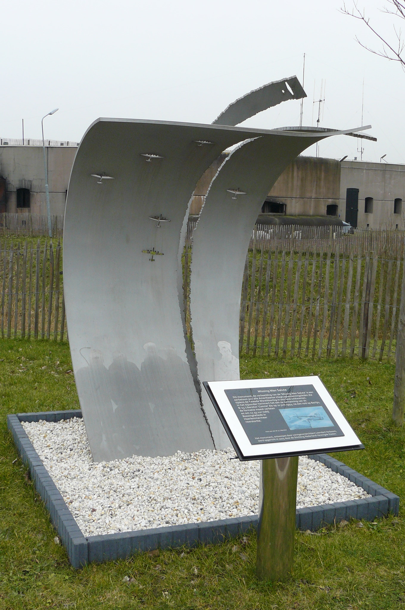 Fort bij Aalsmeer: monument Missing Man Salute voor alle Amerikaanse vliegtuigbemanningen die tijdens de Tweede Wereldoorlog in ons land zijn omgekomen.